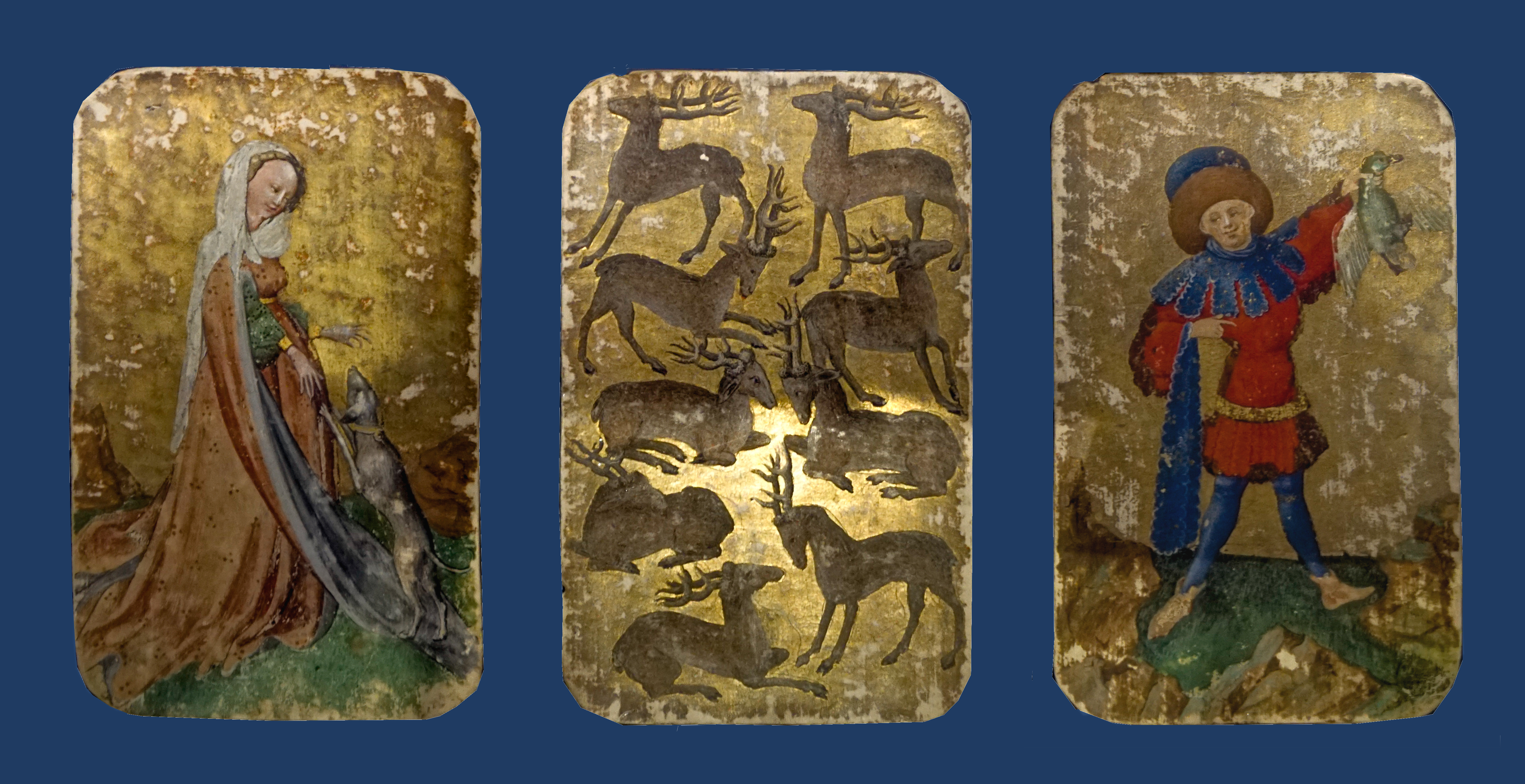 Kunstkammer im Landesmuseum Württemberg, Stuttgart: Stuttgarter Kartenspiel, Oberrhein, um 1430